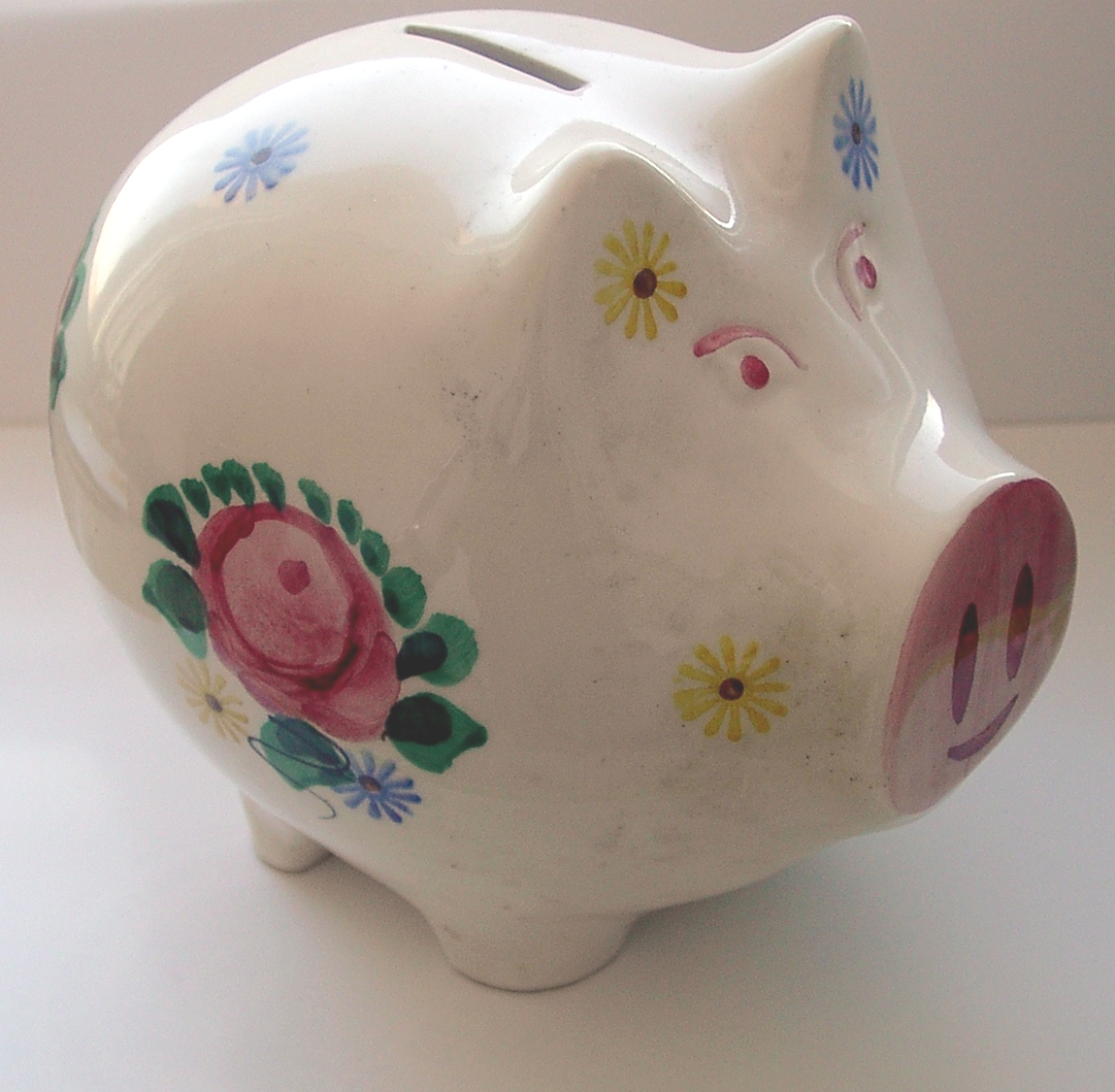 Piggy bank, 2005